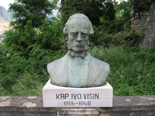 Фотография бюста, перед собором города Прчань (Черногория).